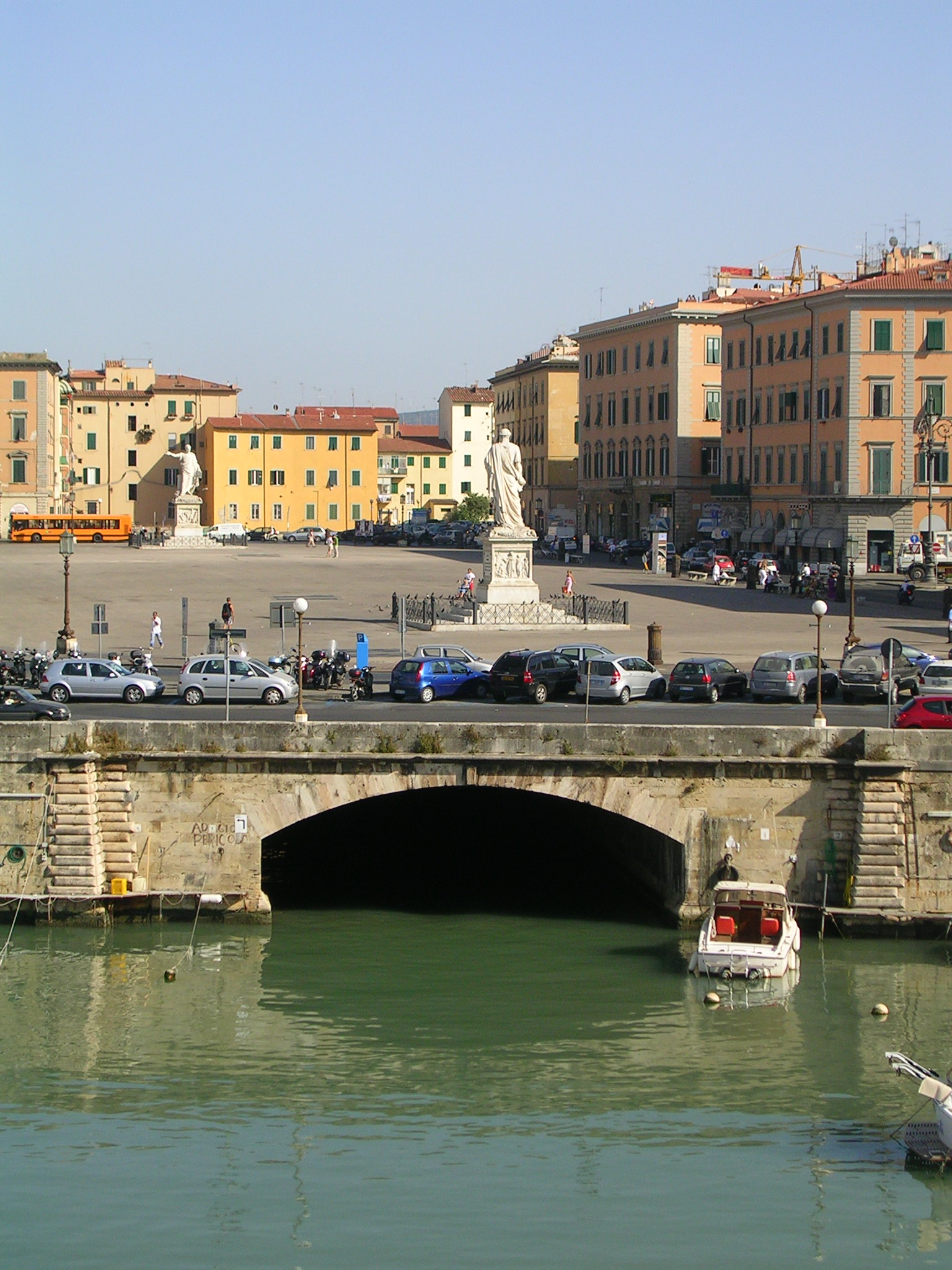 Livorno: veduta della Piazza della Repubblica, sul Fosso Reale, realizzata nella prima metà del XIX secolo su progetto di Luigi Bettarini.